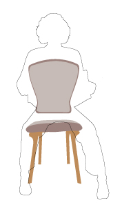 Проекционная схема посадки на стуле с плоским сиденьем.